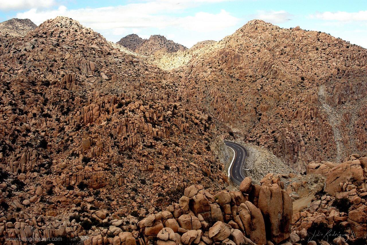 La Rumorosa. Carretera Tijuana-Mexicali. 2008.